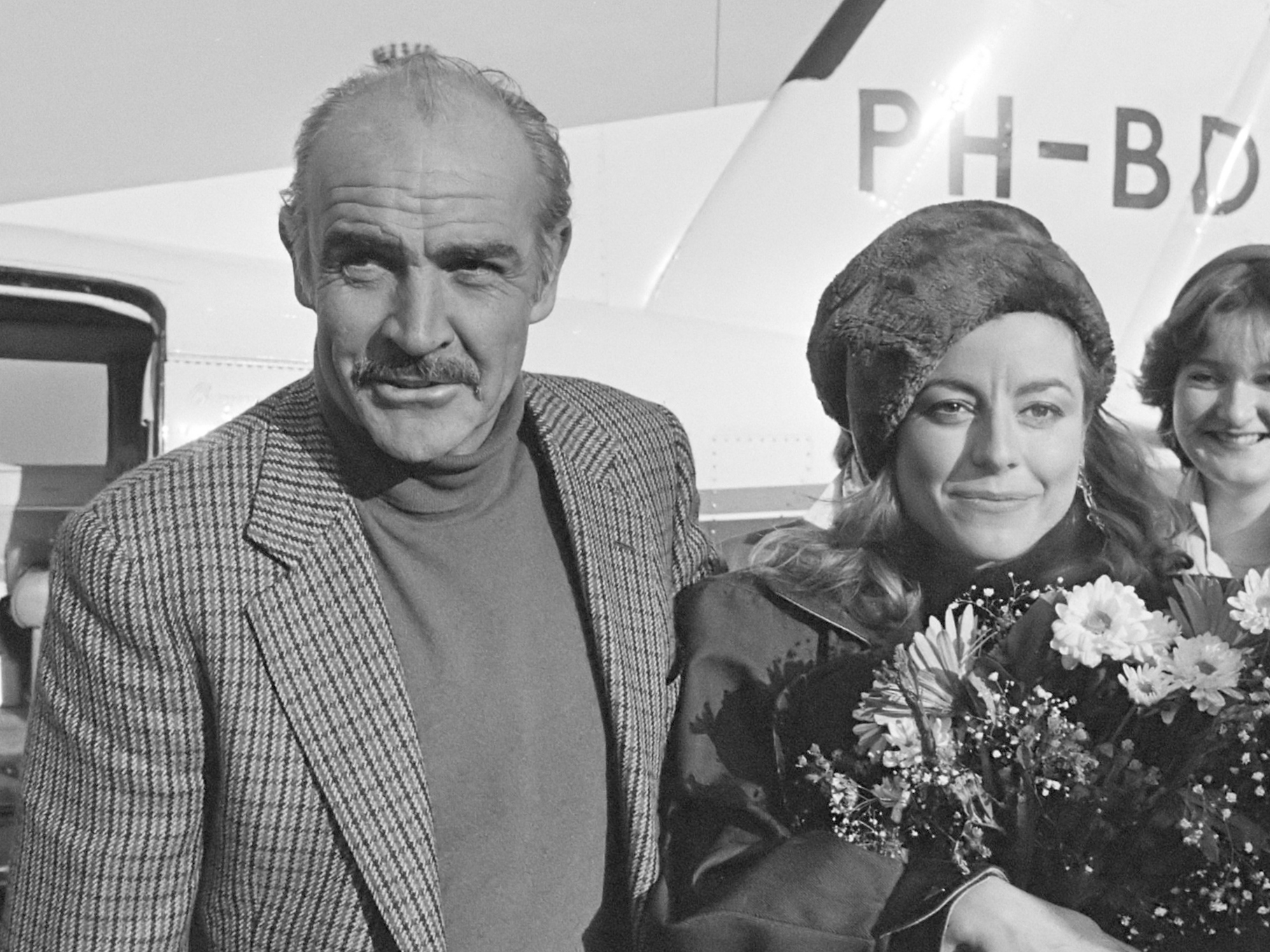 Sean Connery en Saskia Cohen-Tanugi op Schiphol 23 november 1983